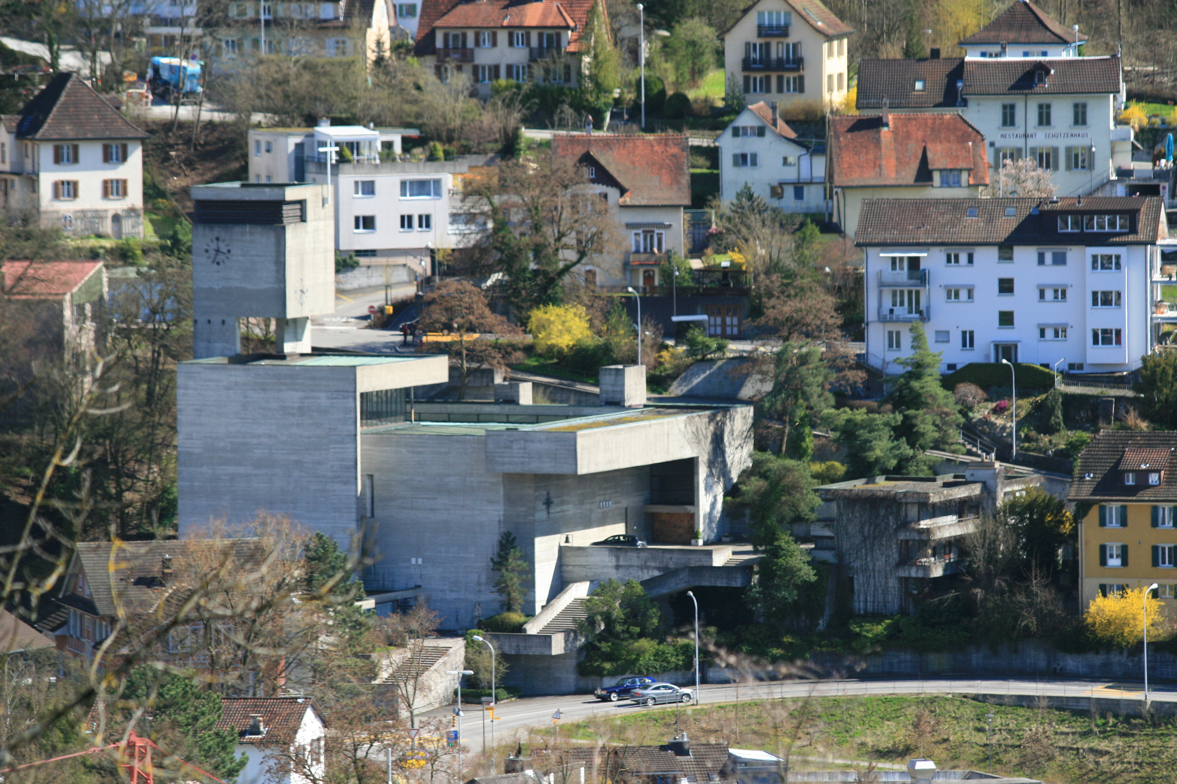 römisch-katholische Kirche